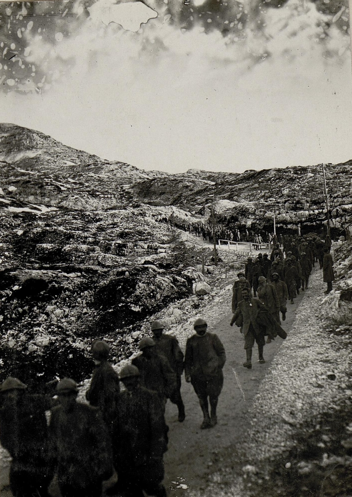 Abtransport gefangener Italiener von Ortigara Cima Dodici